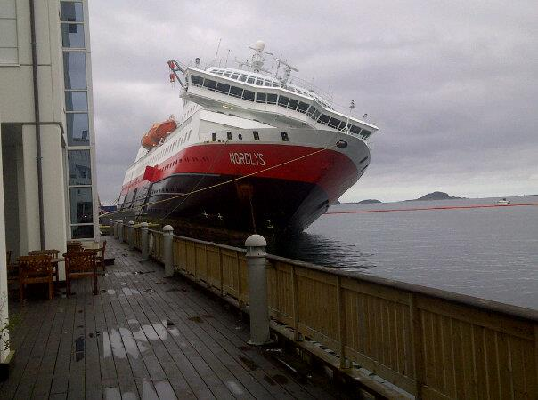 MS «Nordlys» etter ulykken i 2011.